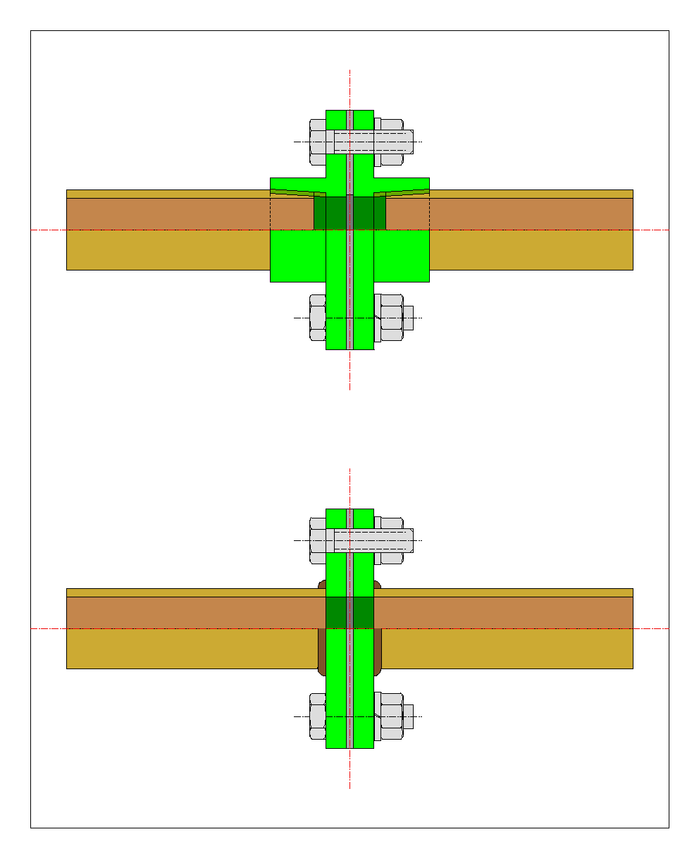 A drawing of flange